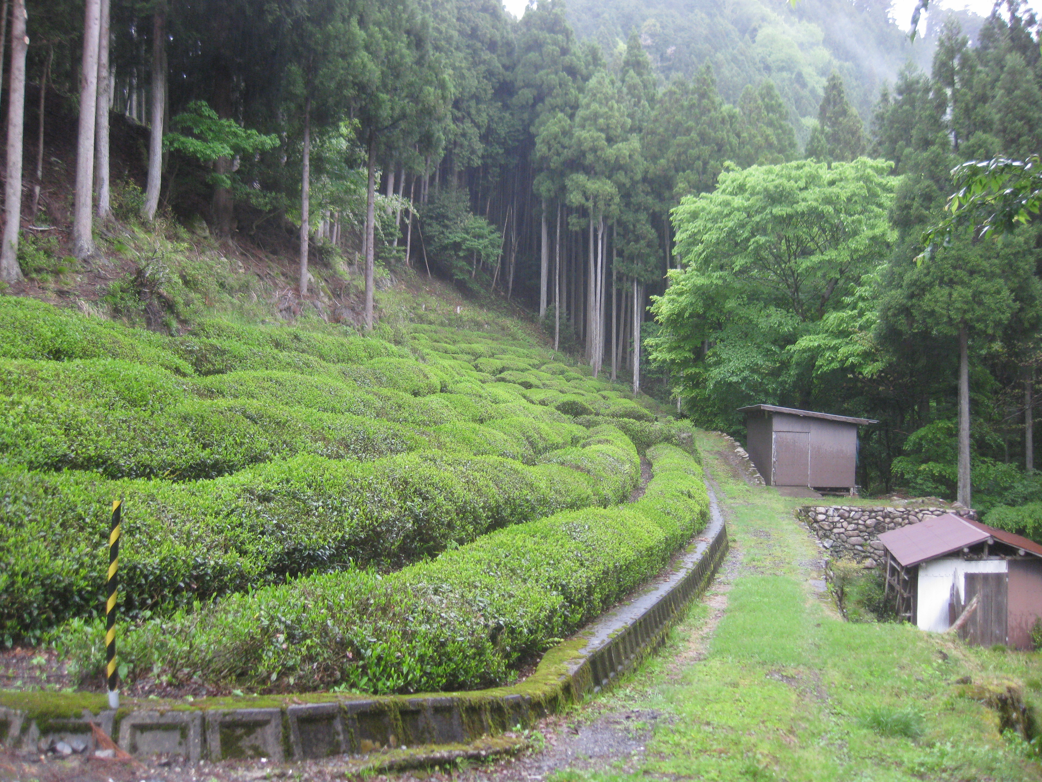 滋賀県東近江市政所町の茶畑。